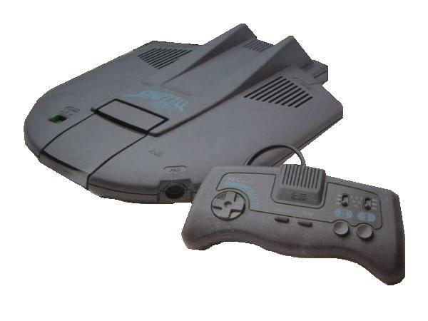 NECホームエレクトロニクス、PCエンジンシャトル